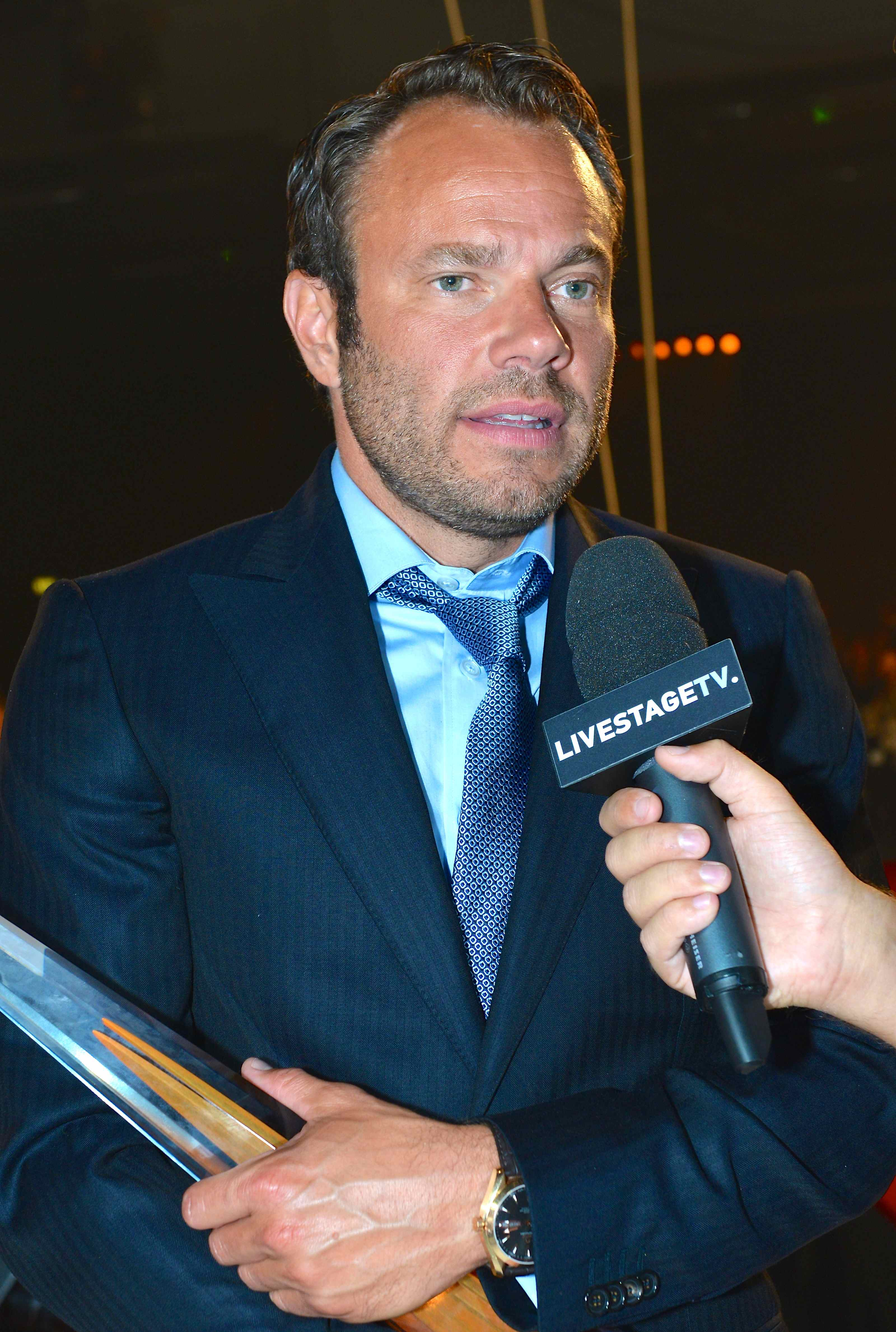 David Hellenius blev Årets manliga programledare på Kristallengalan den 30 augusti 2013.